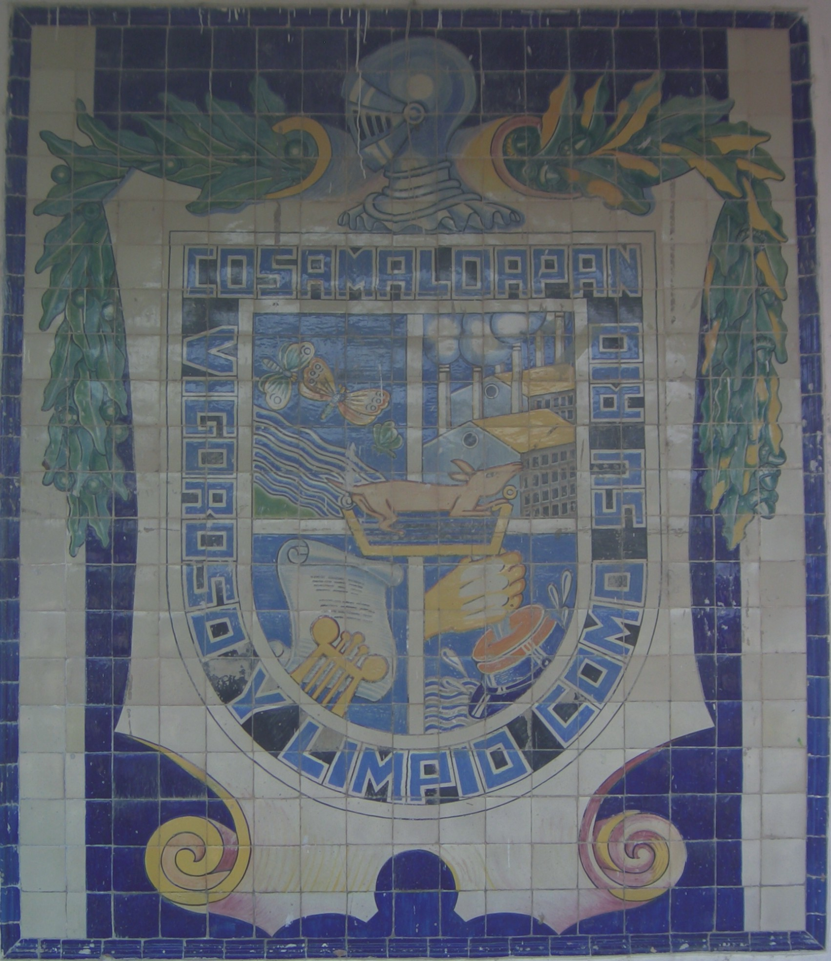 Escudo de armas de Cosamaloapan. Elaborado en azulejo esta en parque central de la ciudad.